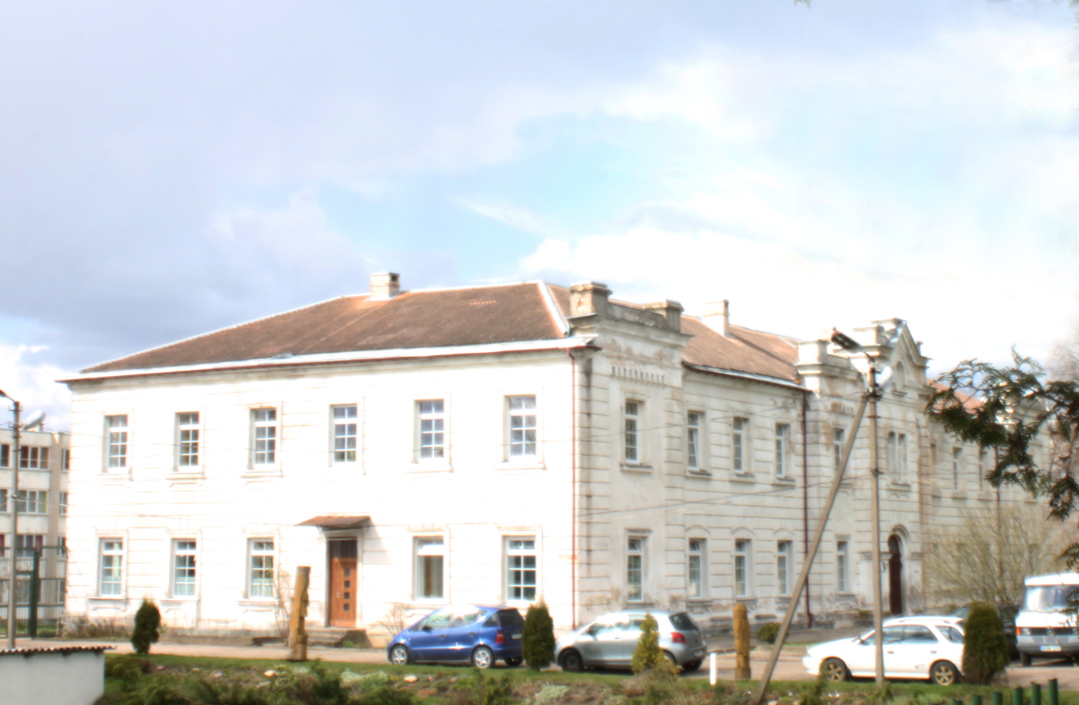 Vėliučionių vaikų socializacijos centras